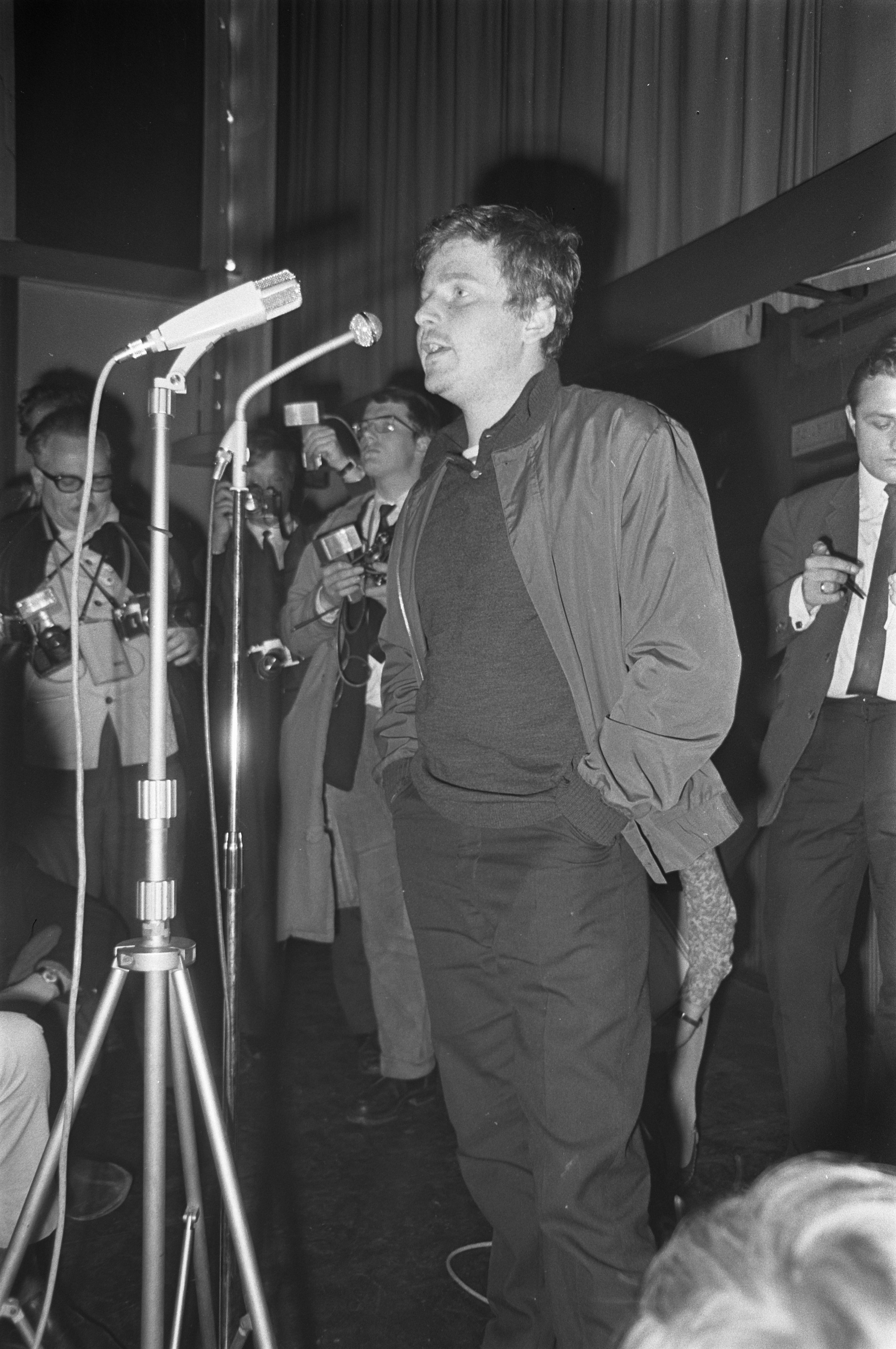 Collectie / Archief : Fotocollectie Anefo Reportage / Serie : [ onbekend ] Beschrijving : Studentenleider David Cohn Bendit spreekt in Capito theater te Amsterdam. Daniel Cohn Bendit Datum : 23 mei 1968 Locatie : Amsterdam, Noord-Holland Trefwoorden : leiders, sprekers, studenten, theaters Persoonsnaam : BENDIT DANIEL COHN, Capito Fotograaf : Nijs, Jac. de / Anefo Auteursrechthebbende : Nationaal Archief Materiaalsoort : Negatief (zwart/wit) Nummer archiefinventaris : bekijk toegang 2.24.01.05 Bestanddeelnummer : 921-3766